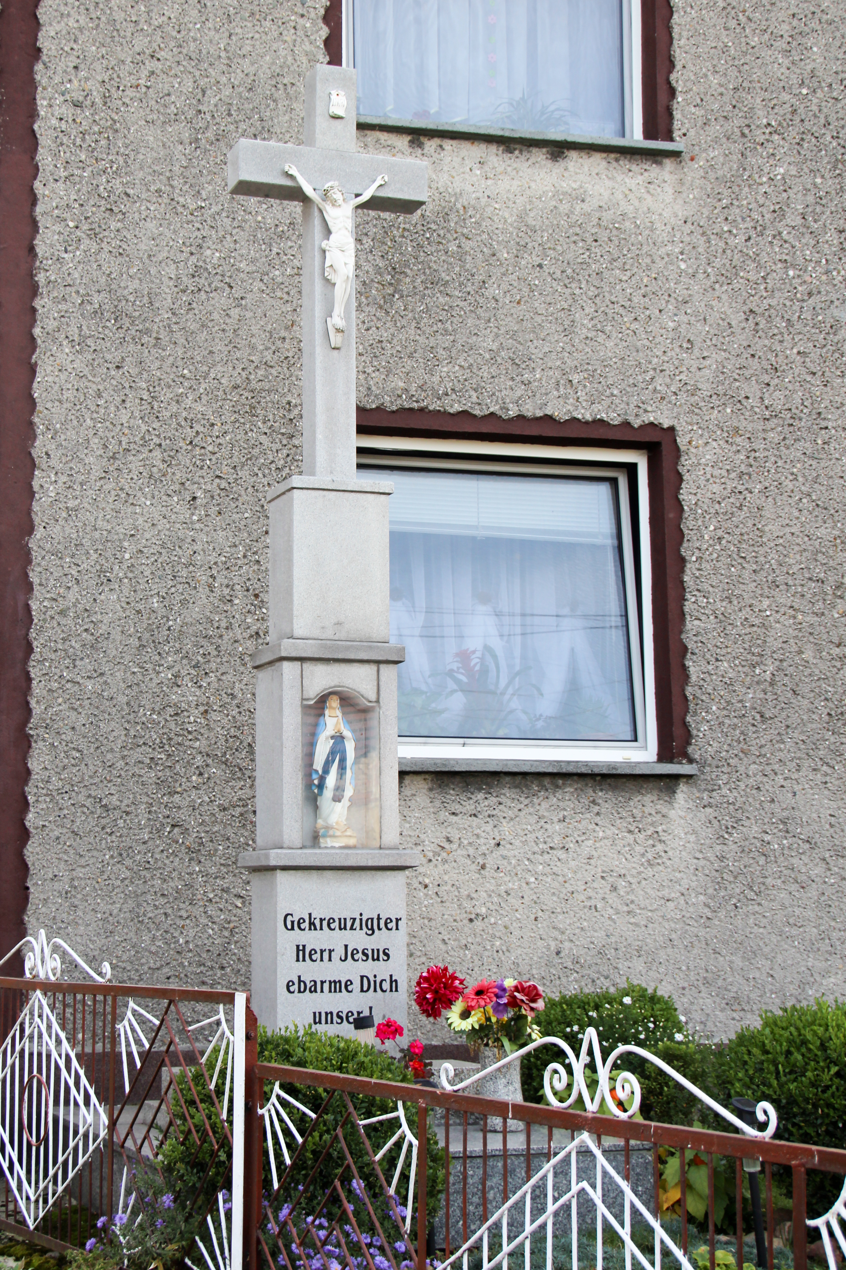 Połowa (w j. niem. Puhlau) – wieś w Polsce położona w województwie opolskim, w powiecie kędzierzyńsko-kozielskim, w gminie Polska Cerekiew.